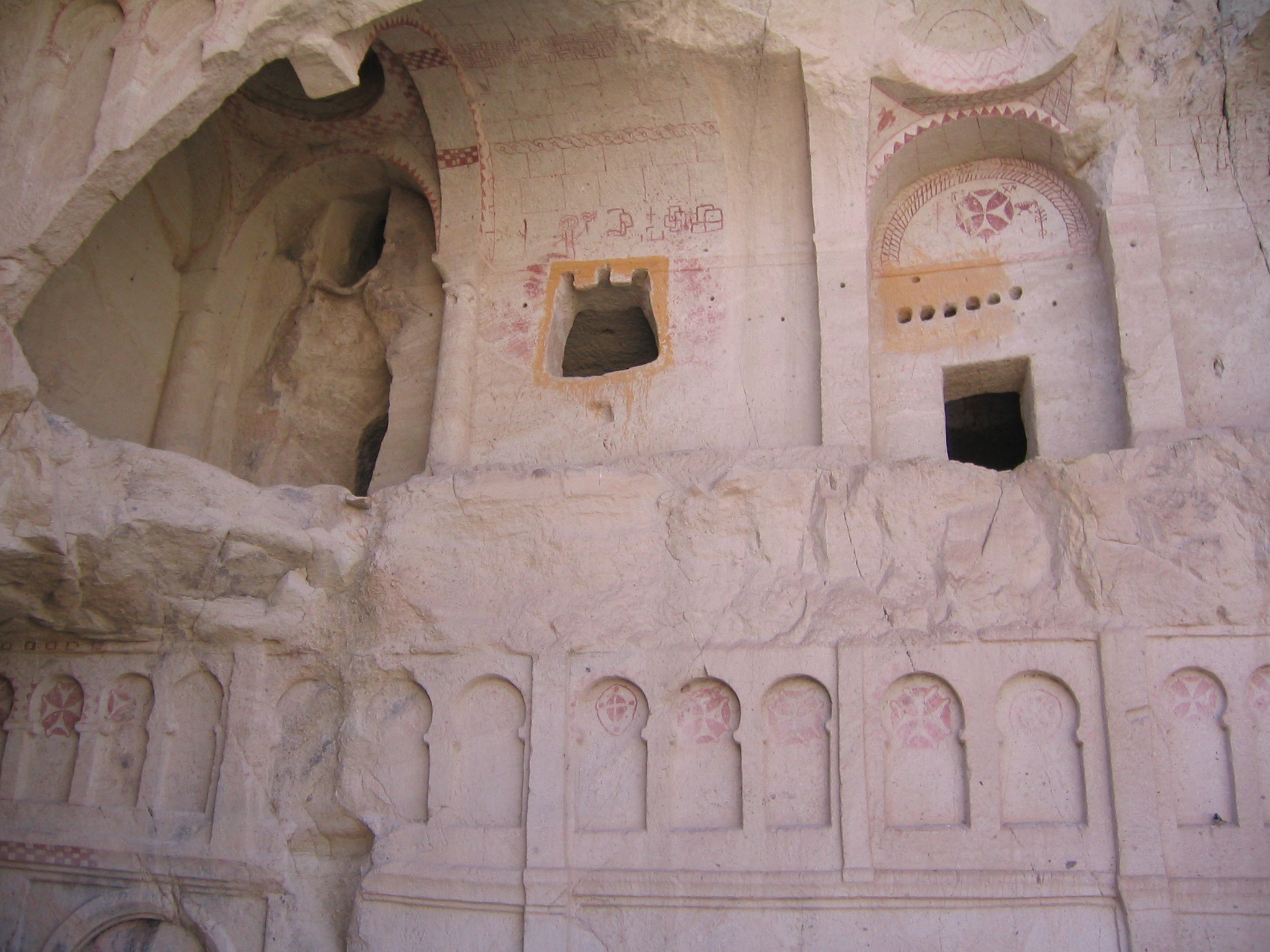 Museo al Aire Libre de Göreme, Cappdocia (Turquía).